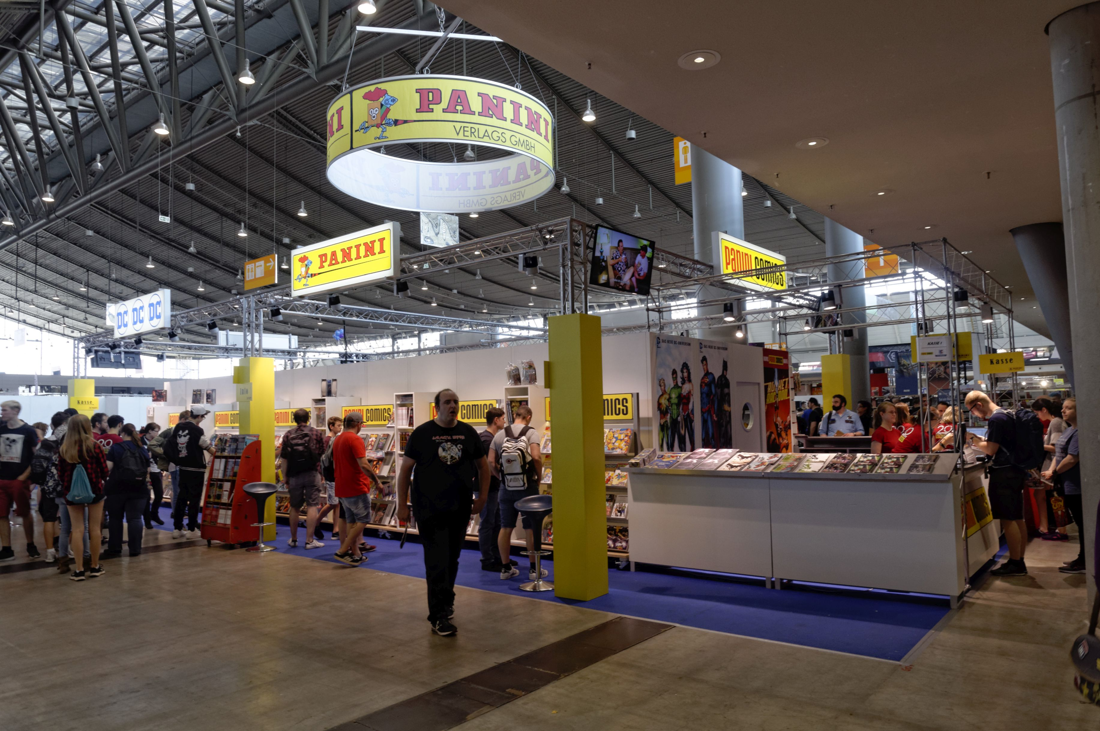 Bilder von der Comic Con Germany in Stuttgart 2018